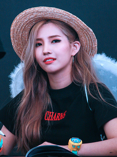 6월 2일 (여자)아이들 팬사인회